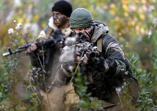 Подразделение специального назначения Вооруженных Силах России